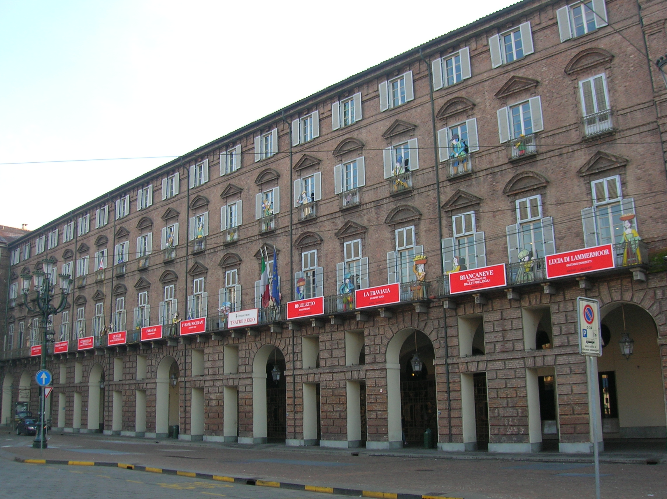 Teatro Regio (Turin)